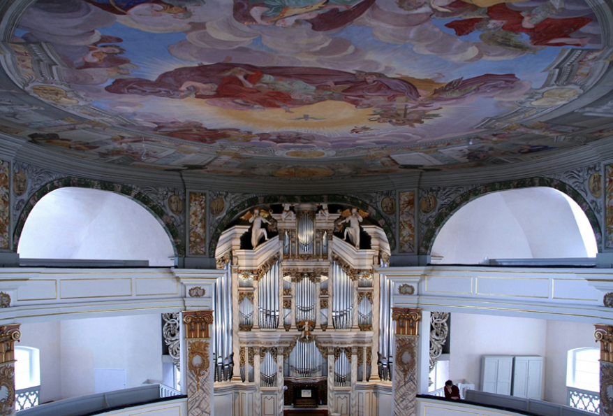 Waltershausen, Inneres der Stadtkirche